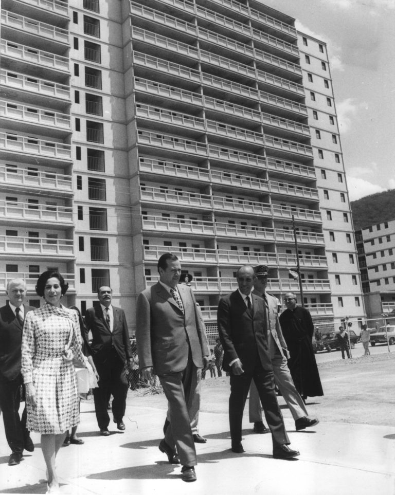 Inauguración UD-3 de Caricuao - 31 de marzo de 1970